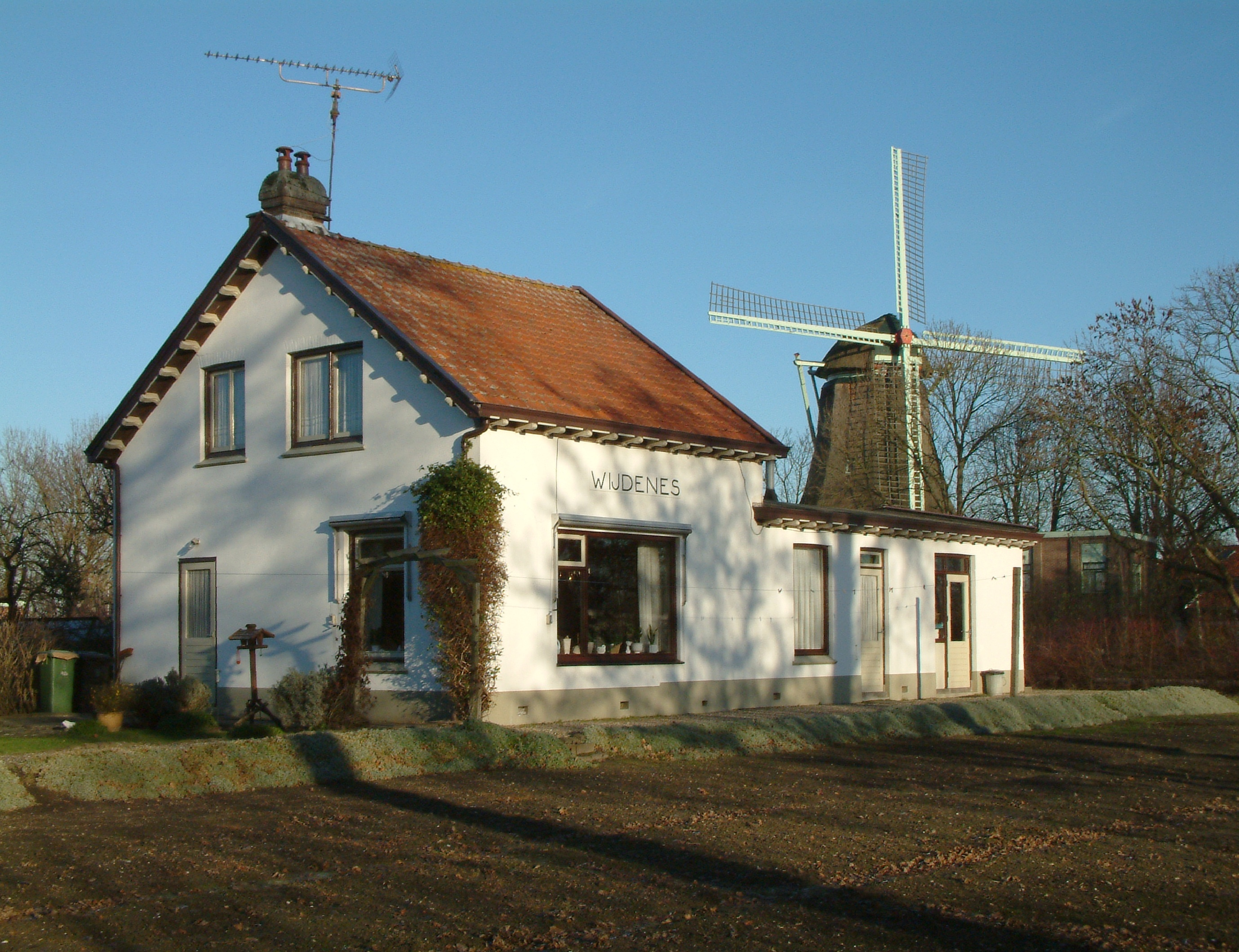 Wijdenes, Nederland. Voormalig tramstation van de Zuider-Koggelijn.